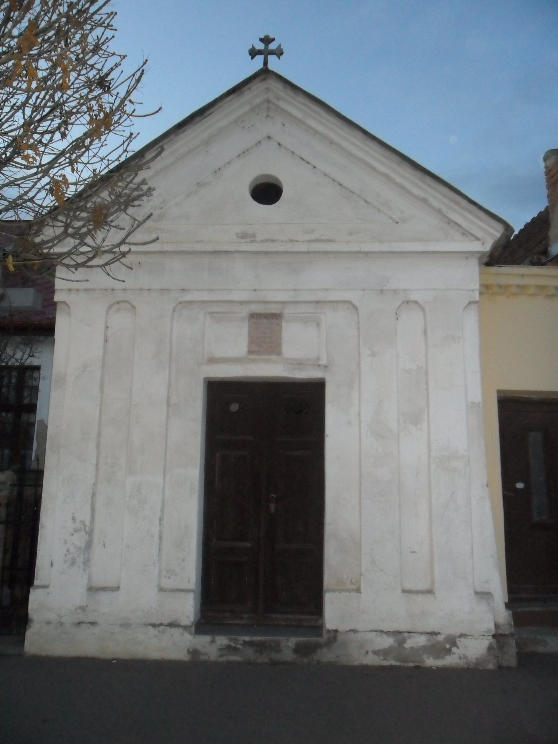 A paksi Szent Vendel kápolna: a biskói komptragédia áldozatai innen indultak utolsó útjukra